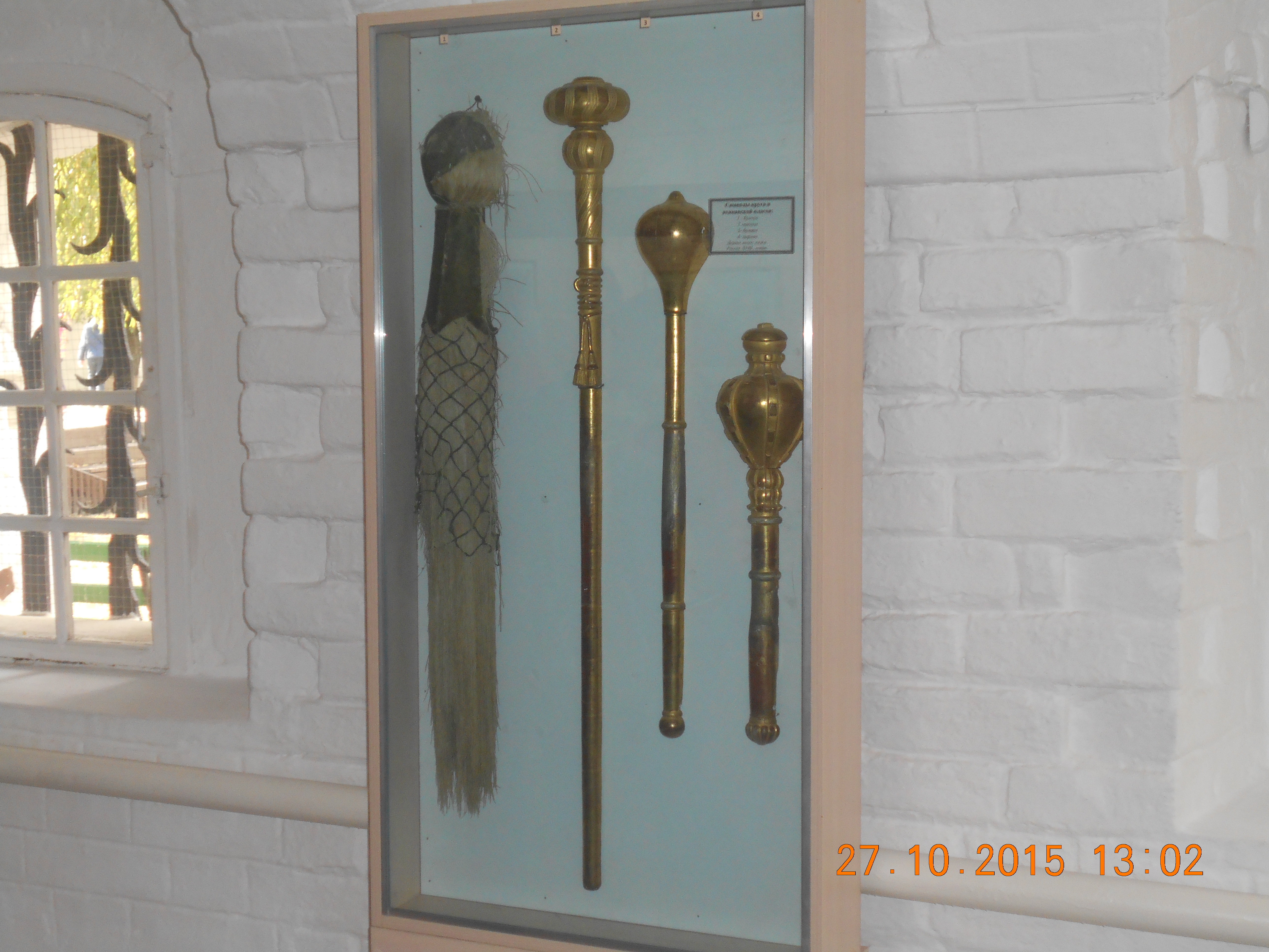 Музей. Станица Старочеркасская.